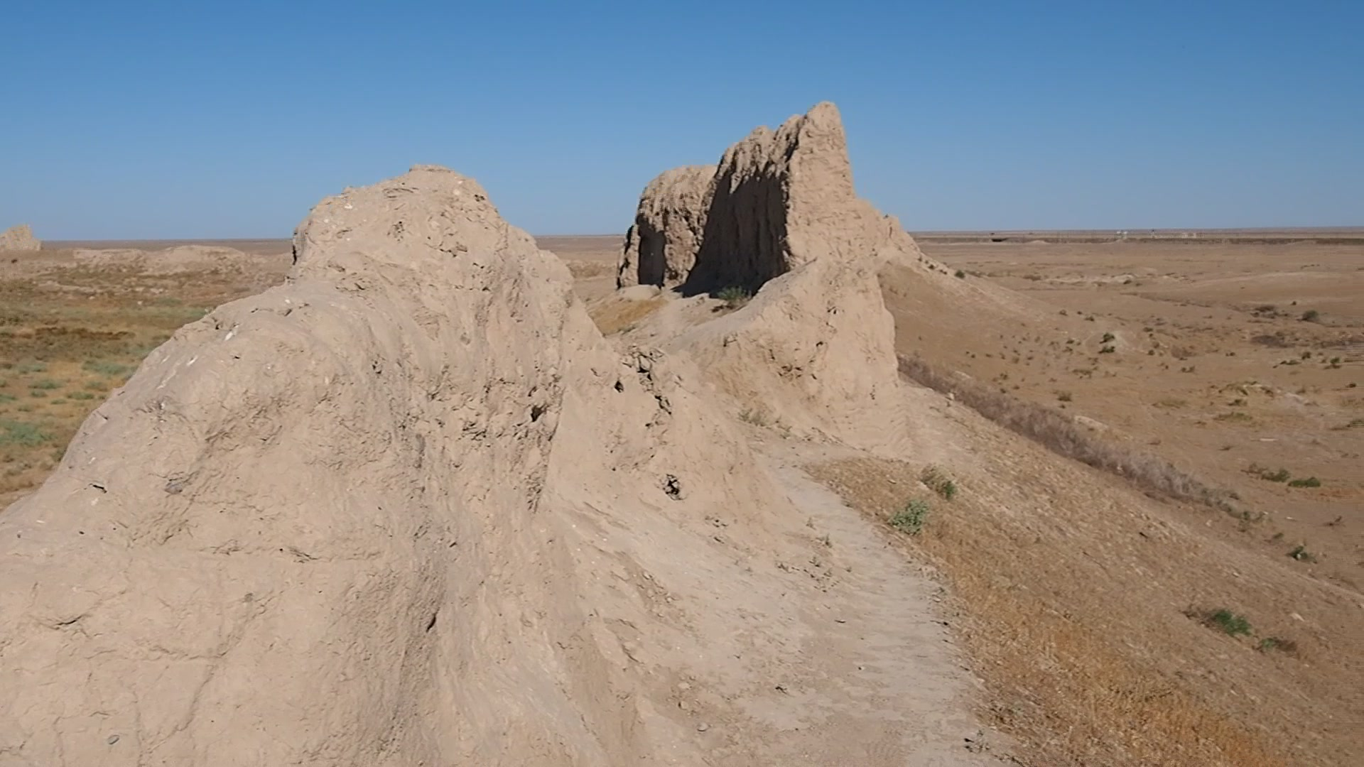 Ruinen von Sawran unweit Türkistan, Kasachstan